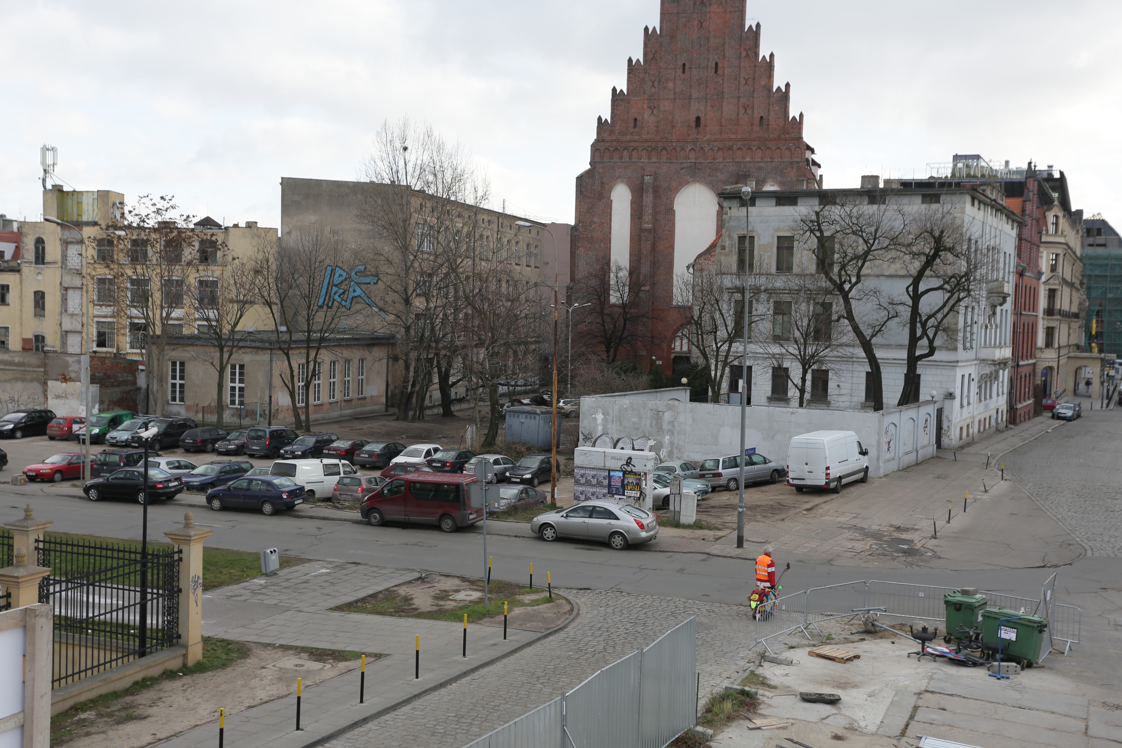 ulica Zamkowa (z lewej) i skrzyżowanie z ul. Modrzejewskiej (na prawo), widok z dachu budowanego Narodowego Forum Muzyki; na wprost kościół pw. św. Stanisława, św. Doroty i św. Wacława